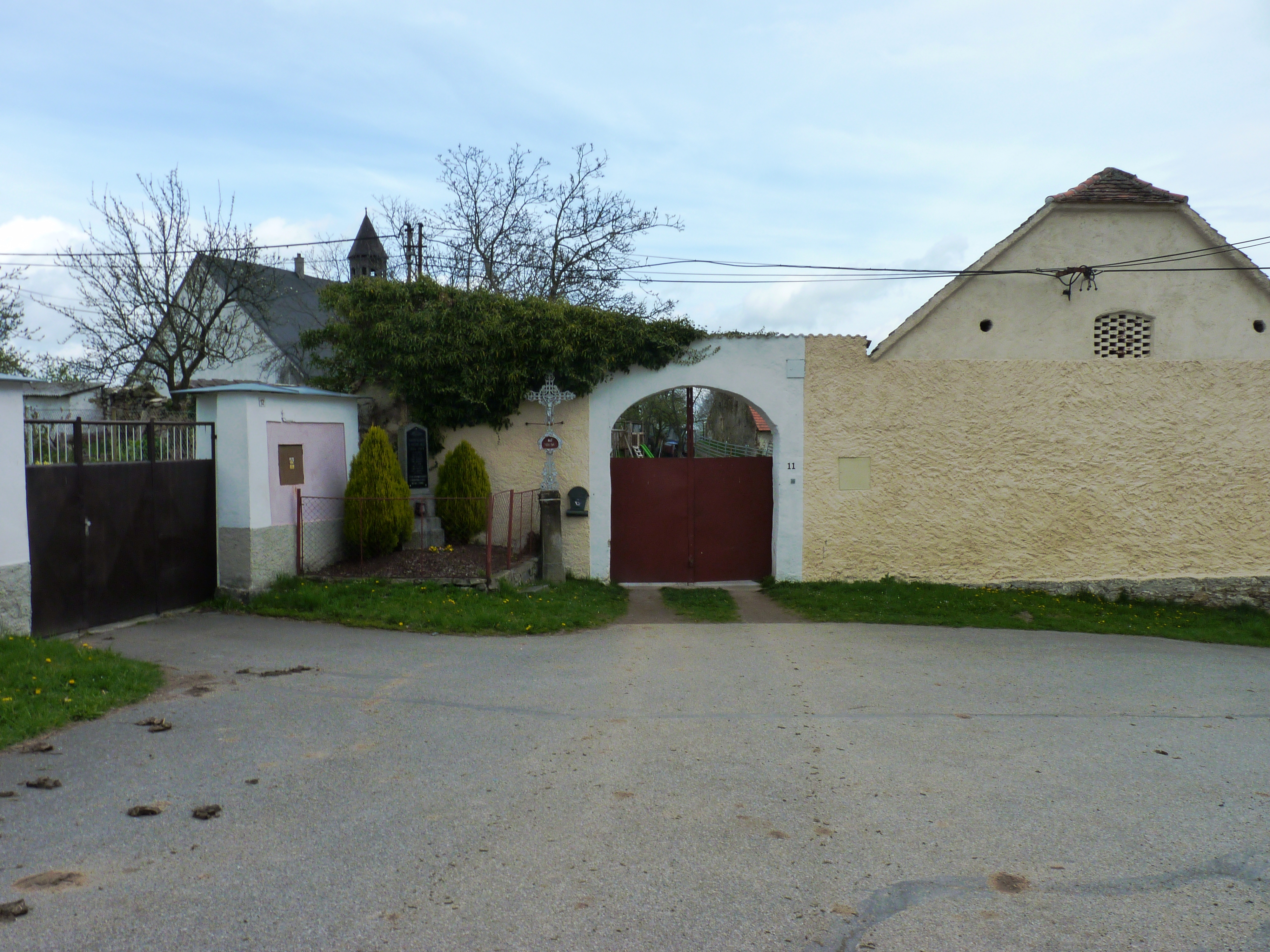 Obec Damíč na Klatovsku.